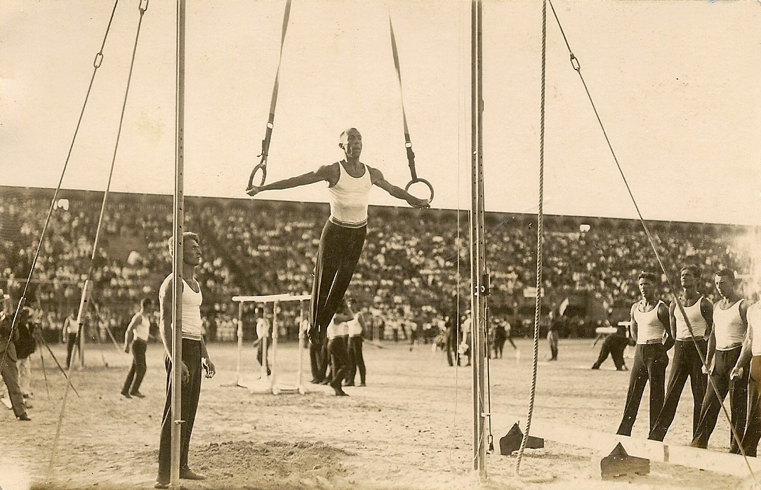 Leon Štukelj na tekmi v Beogradu. Ob njem stoji Boris Gregorka.